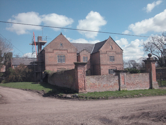 Shotwick Hall